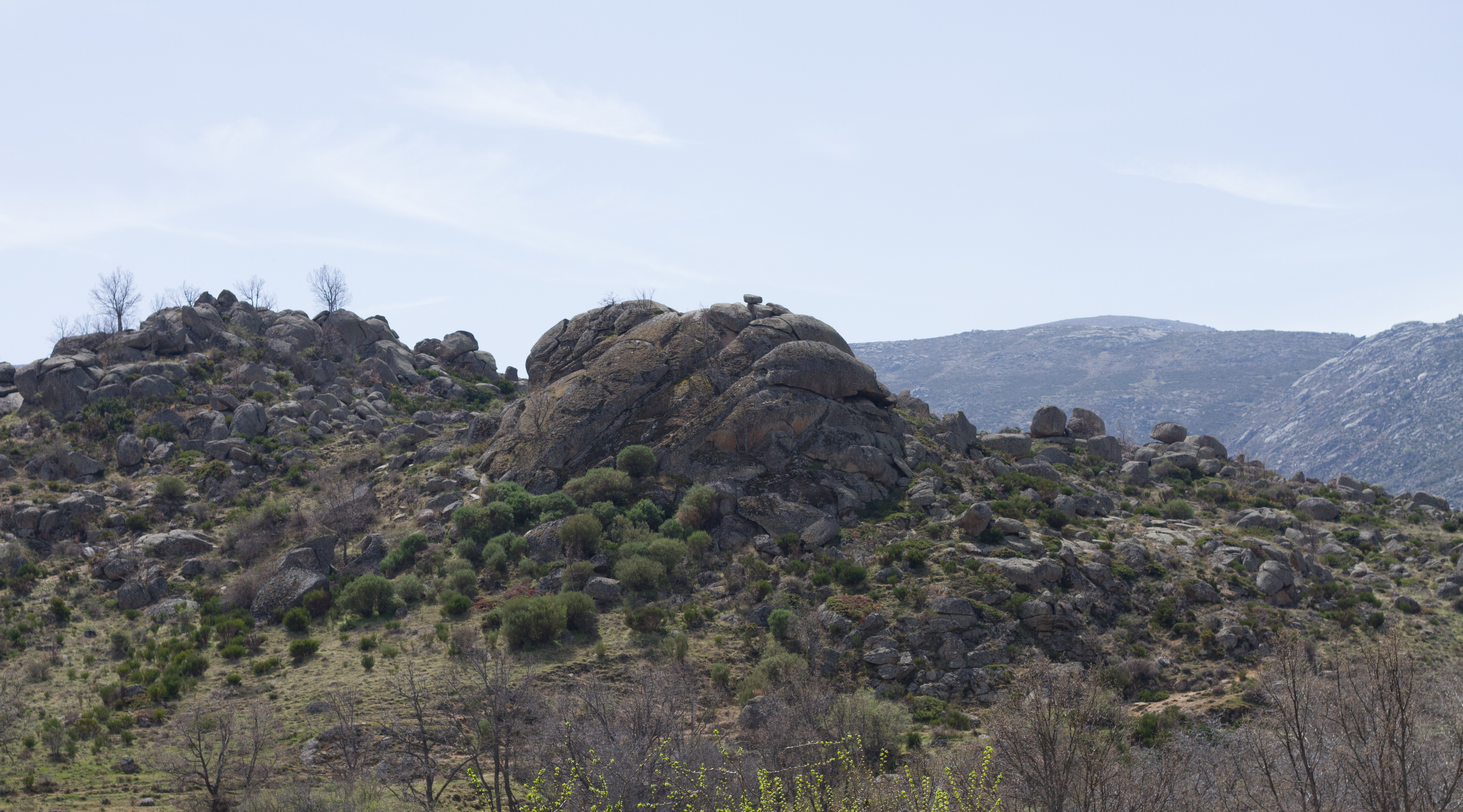 Pandero de las Mozas, donde se encuentra la Herradura